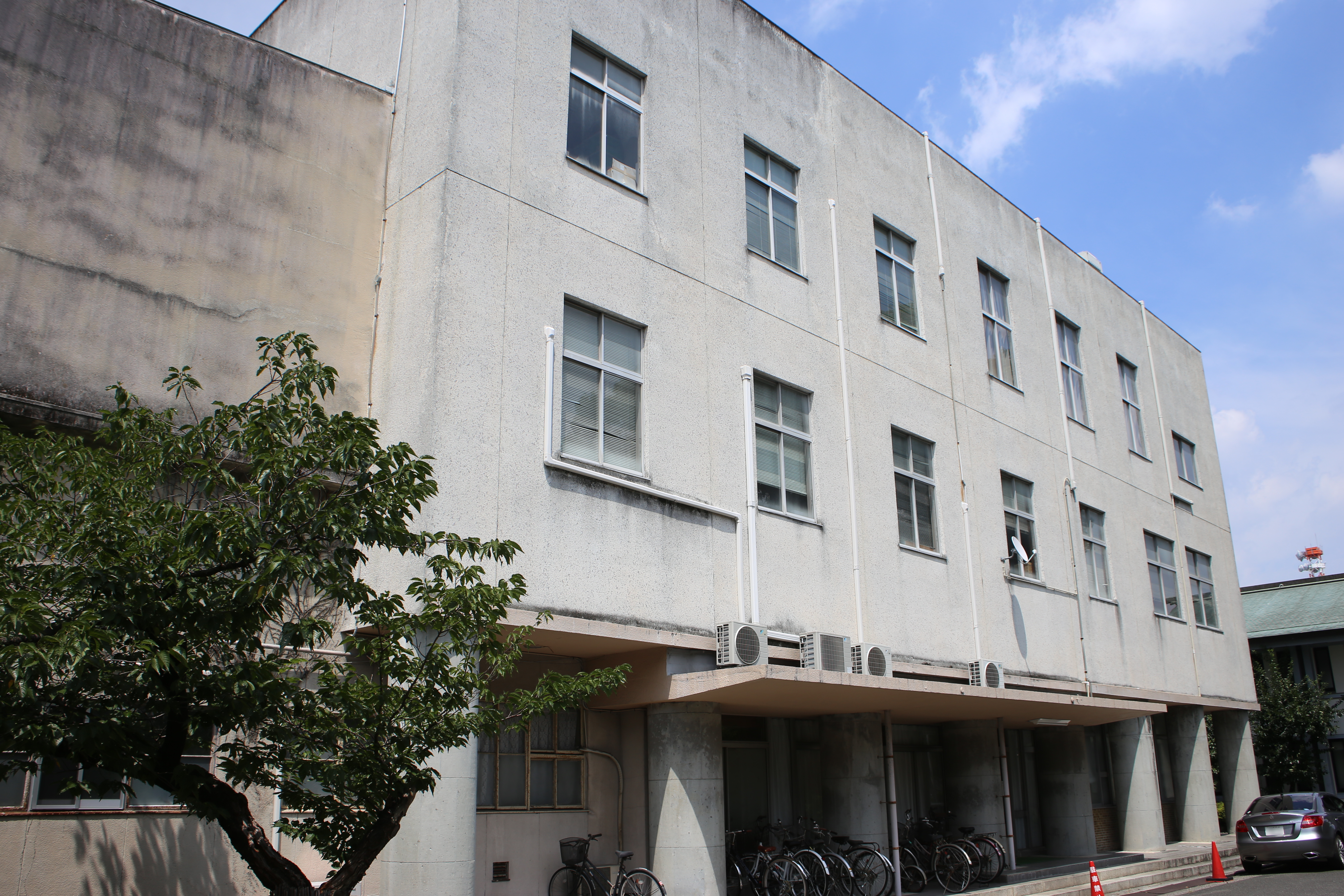 名古屋市中区丸の内一丁目 桜花会館